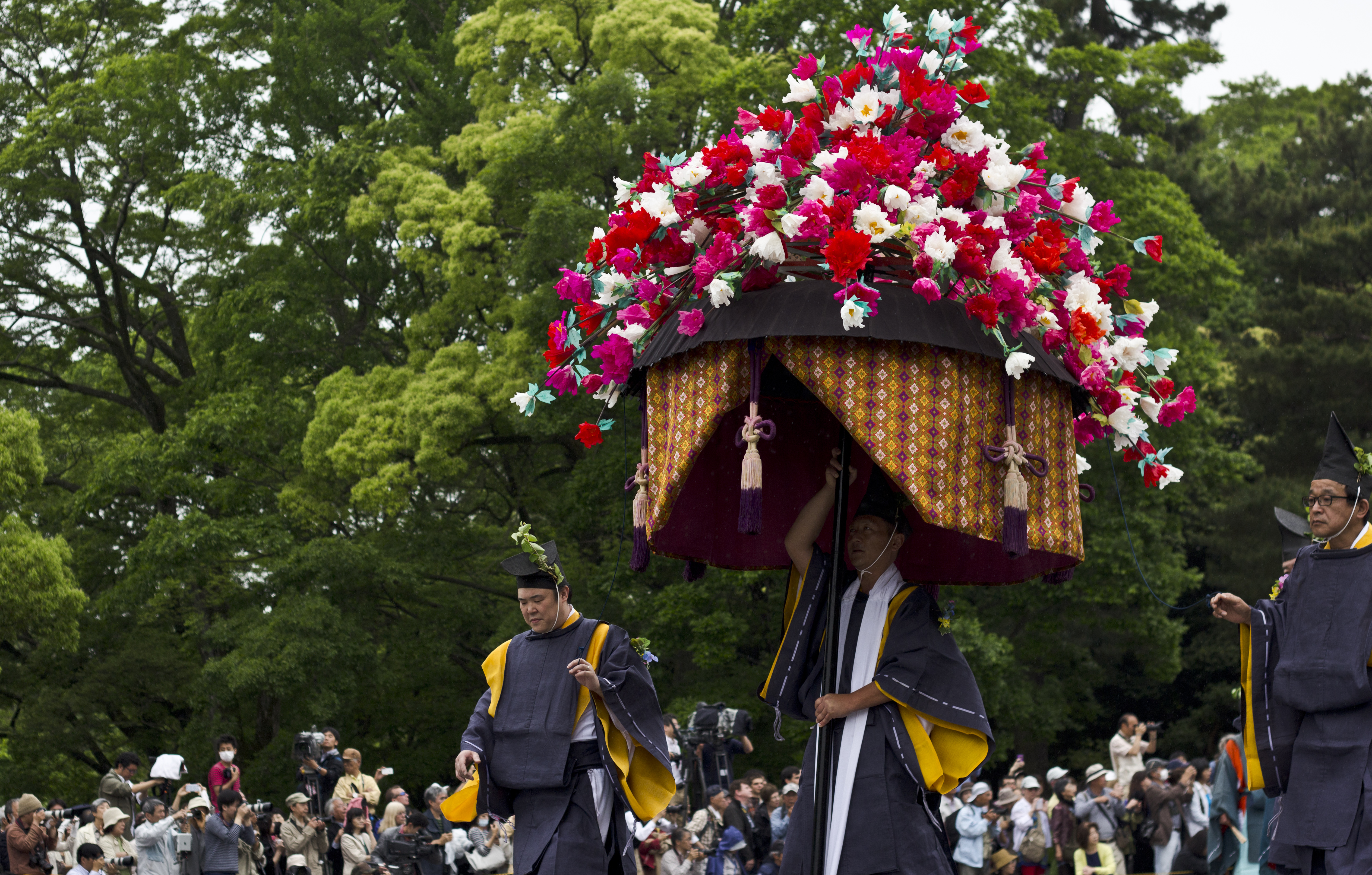 Photo taken during Aoi Matsuri in Kyoto